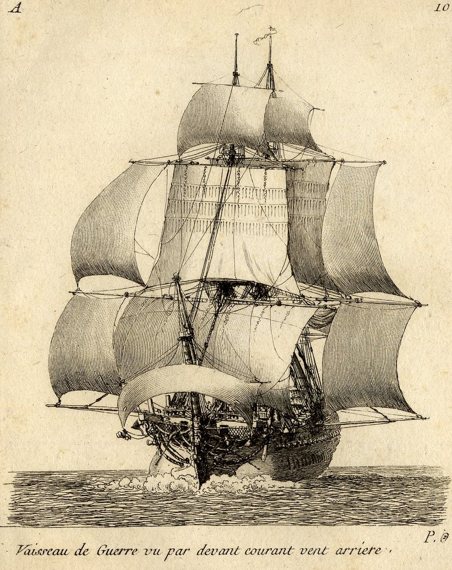 Dessin de Pierre Ozanne, gravé par Yves Le Gouaz. Bibliothèque nationale de France. Vaisseau de ligne de 74 ou 80 canons.